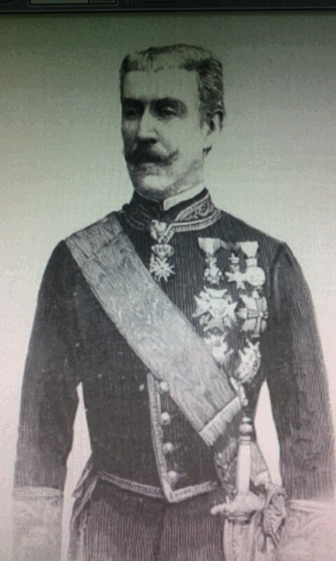 Luis de Potestad y Carter. Marqués de Potestad-Fornari